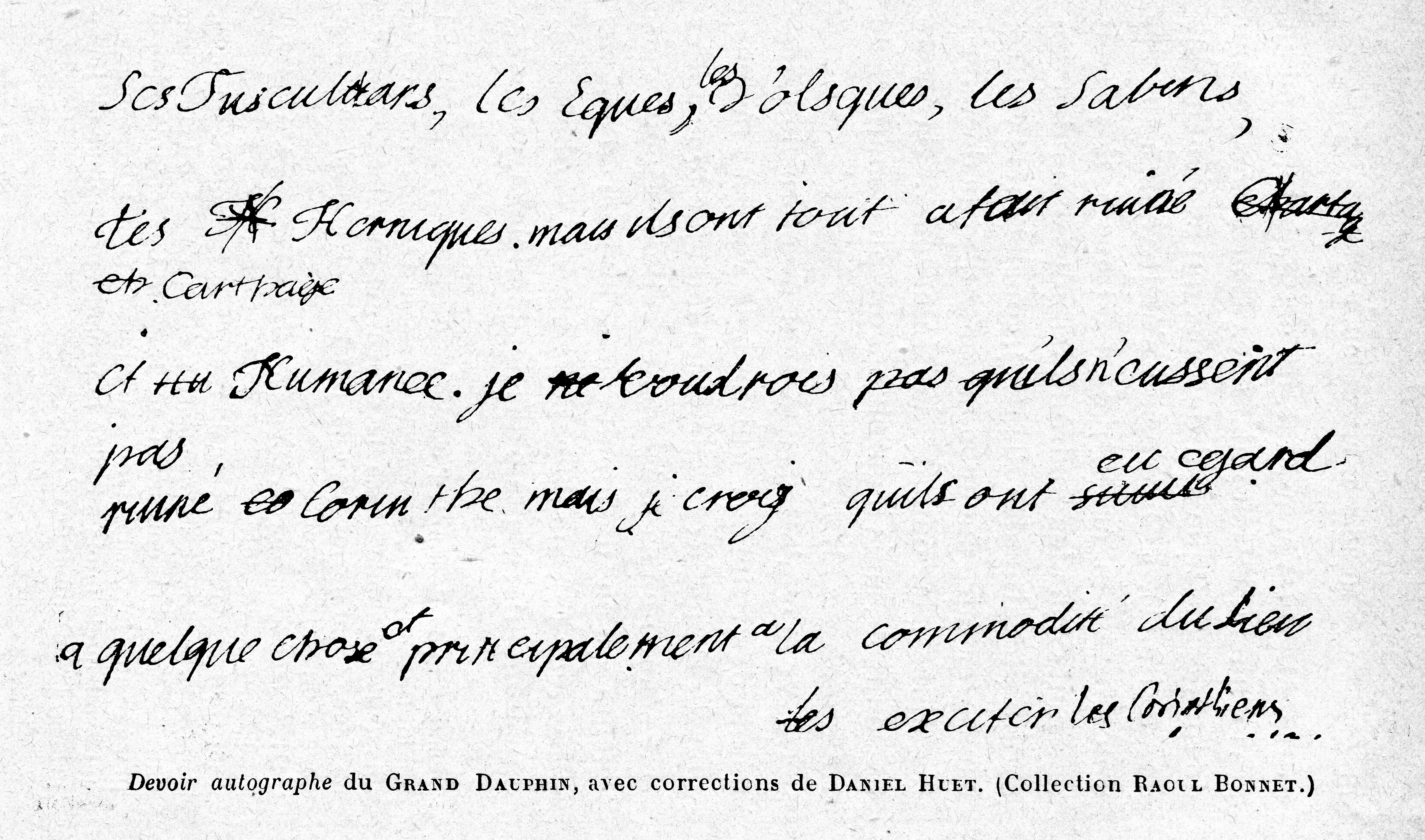 Cabanès, Éducation de Princes022 Devoir autographe du Grand Dauphin, avec corrections de Daniel Huet